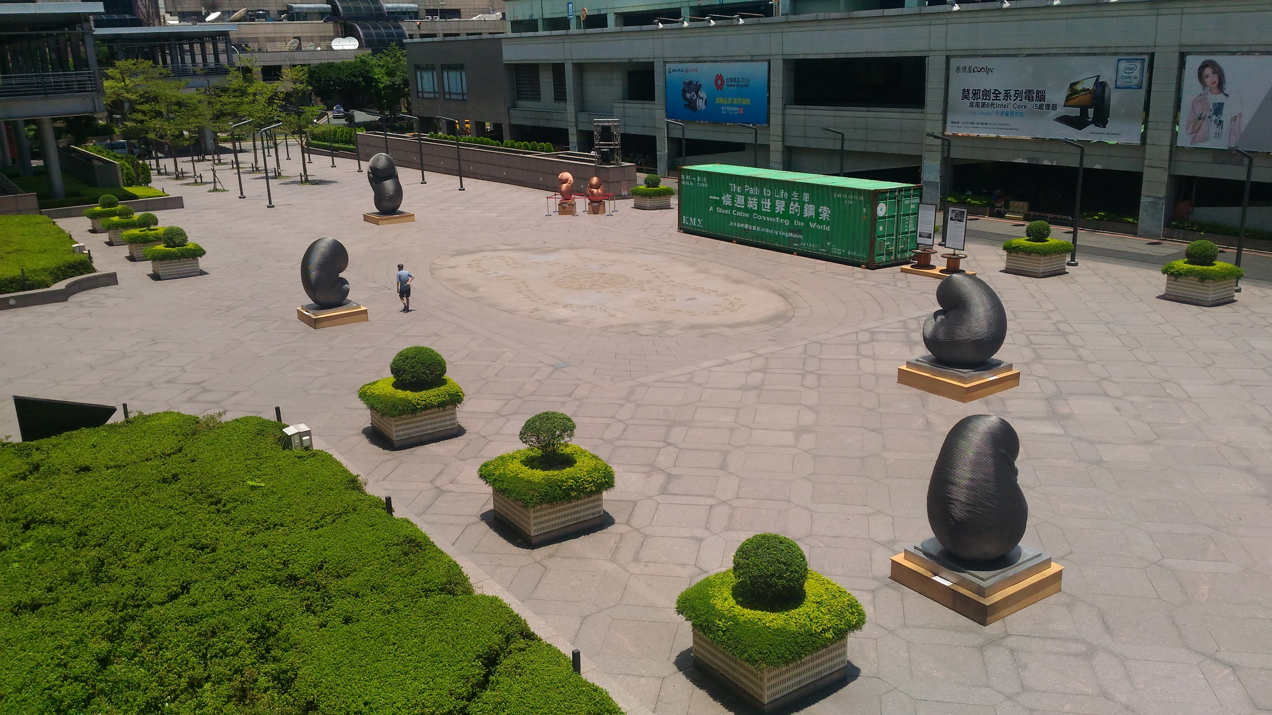 台北101戶外公共藝術作品